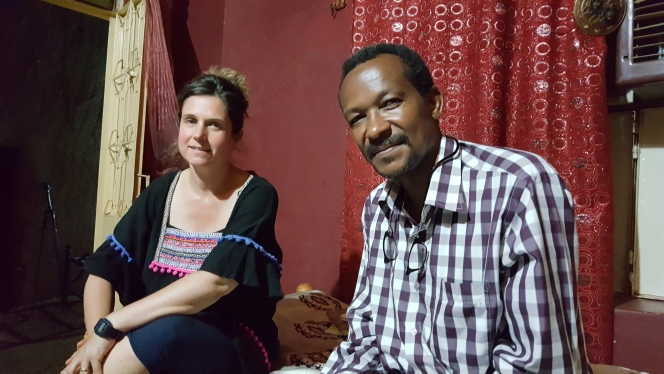 الروائي السوداني منصور الصويم، مع الصحفية ومنتجة الأفلام الوثائقية الفرنسية فرديدرك سيفينتيس